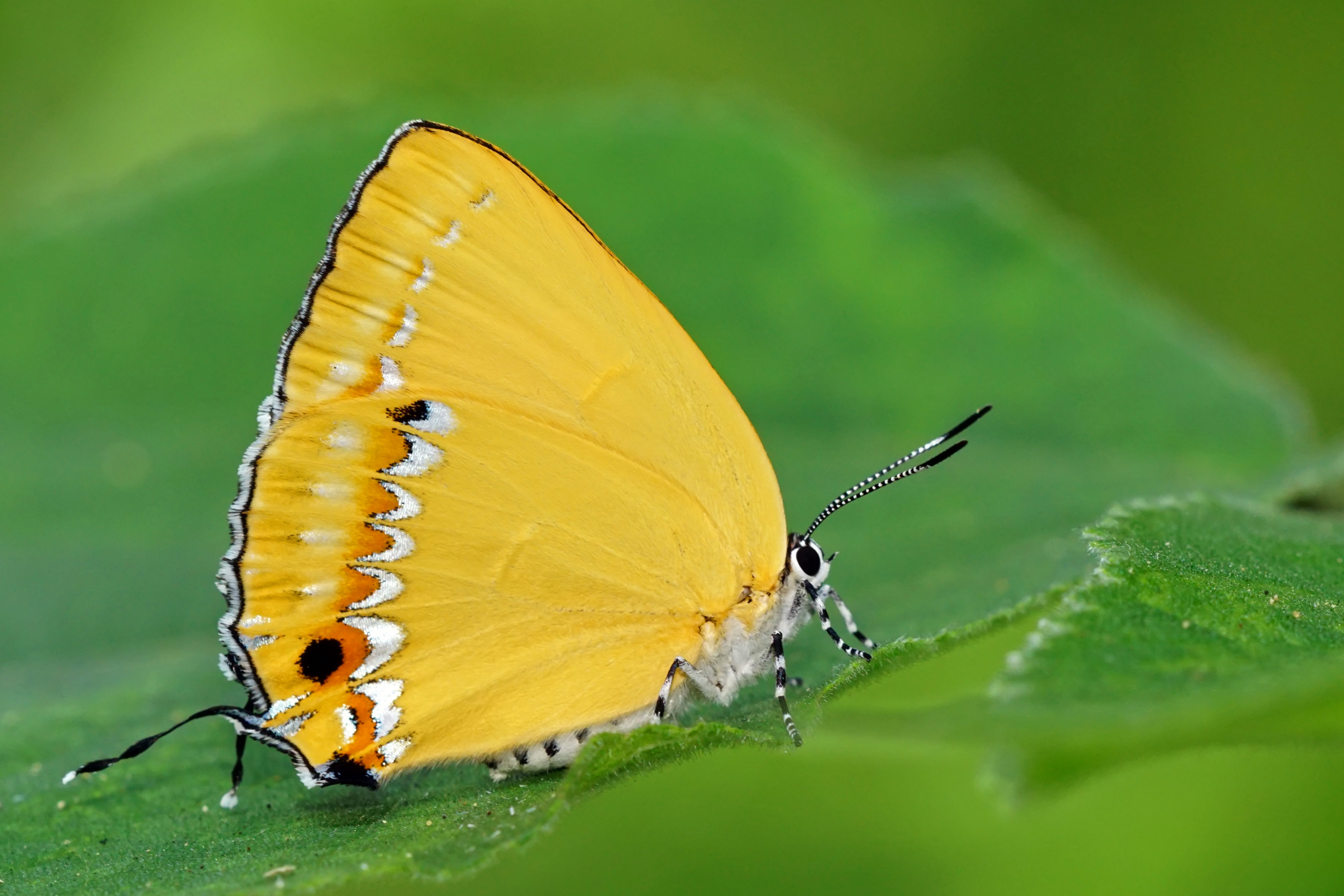 赭灰蝶 Ussuriana (michaelis) takarana